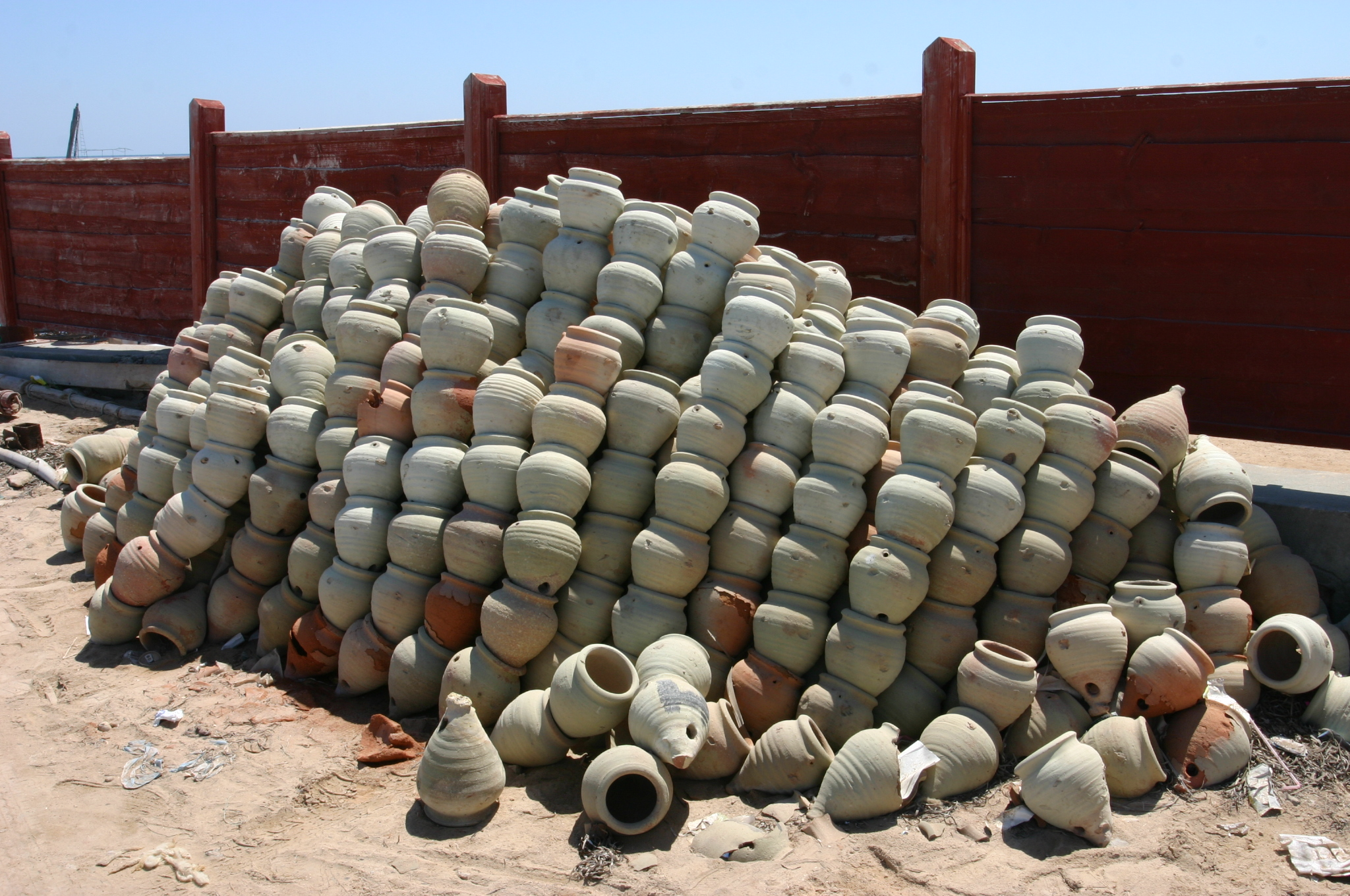 Tas de gargoulettes de terre cuite utilisées pour la pêche aux poulpes dans les îles Kerkennah (Tunisie).